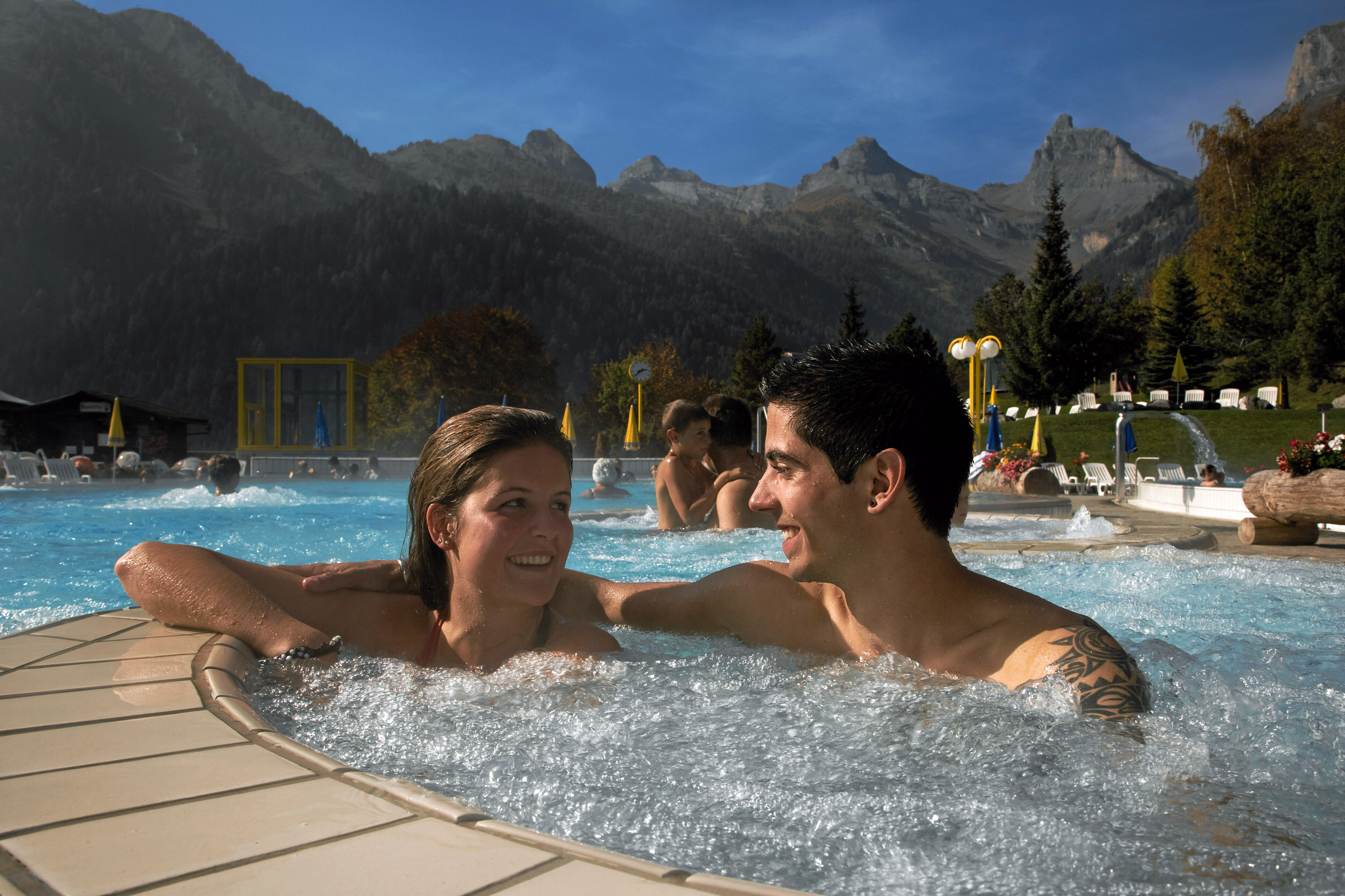 Détente aux Bains thermaux d'Ovronnaz